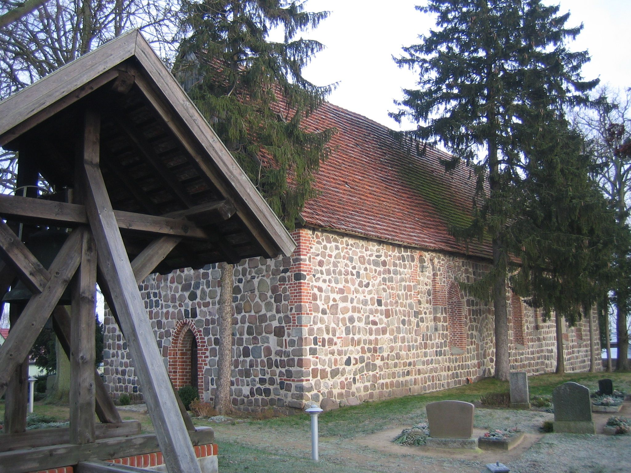 Dorfkirche Teschendorf, Ortsteil von Burg Stargard, Landkreis Mecklenburgische Seenplatte